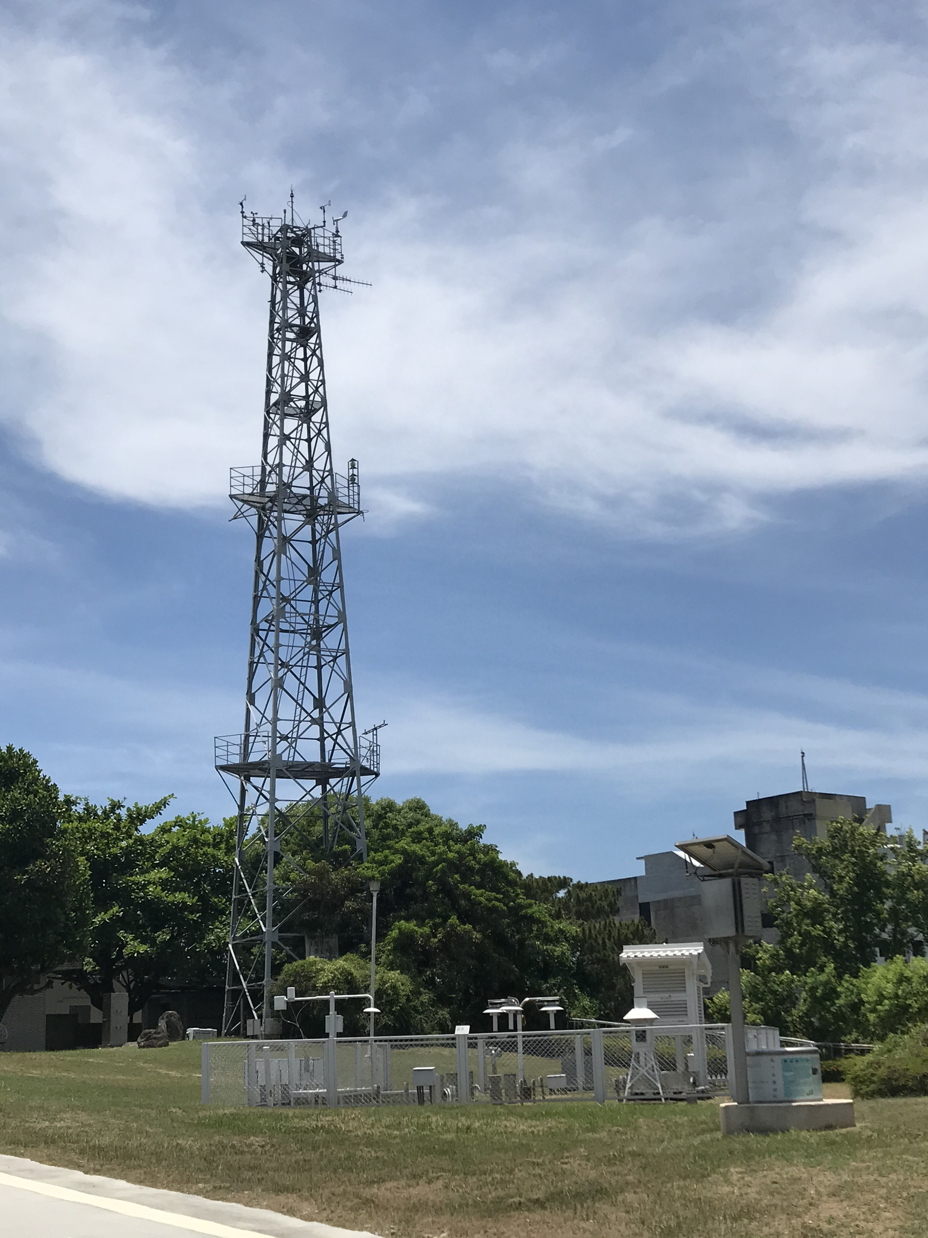 中文（台灣）: 交通部氣象局花蓮氣象站觀測坪